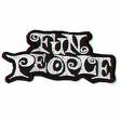 logo de fun people banda argentina hardcore